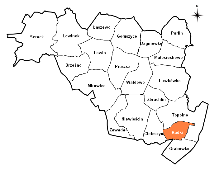 Sołectwo Rudki na tle gminy Pruszcz.